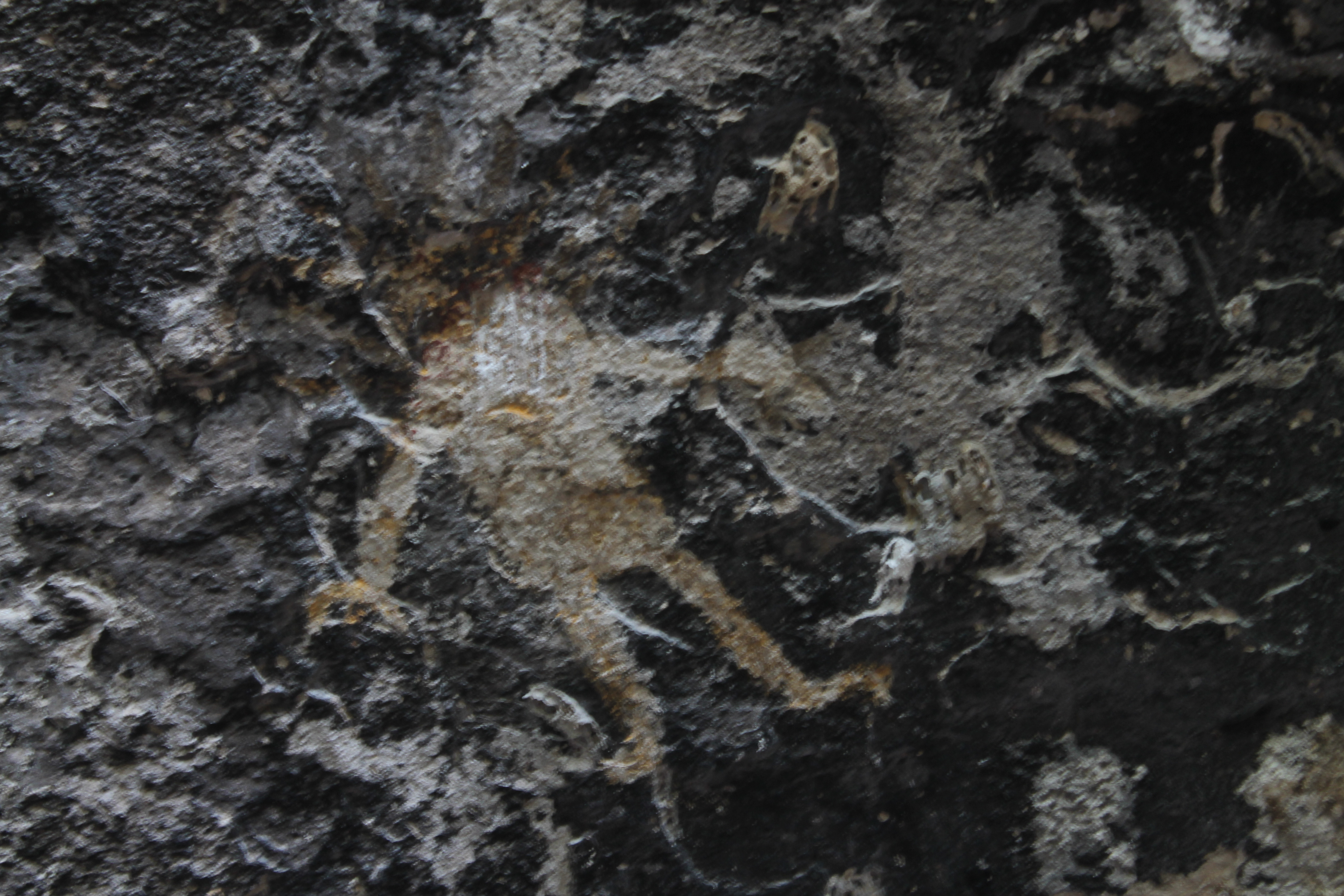 Pinturas Rupestres Corinto Morazan El Salvador Cueva el Espiritu Santo